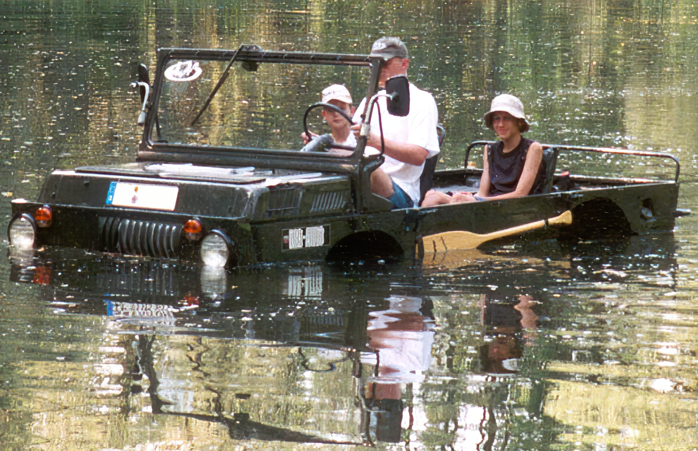 LuAZ967m